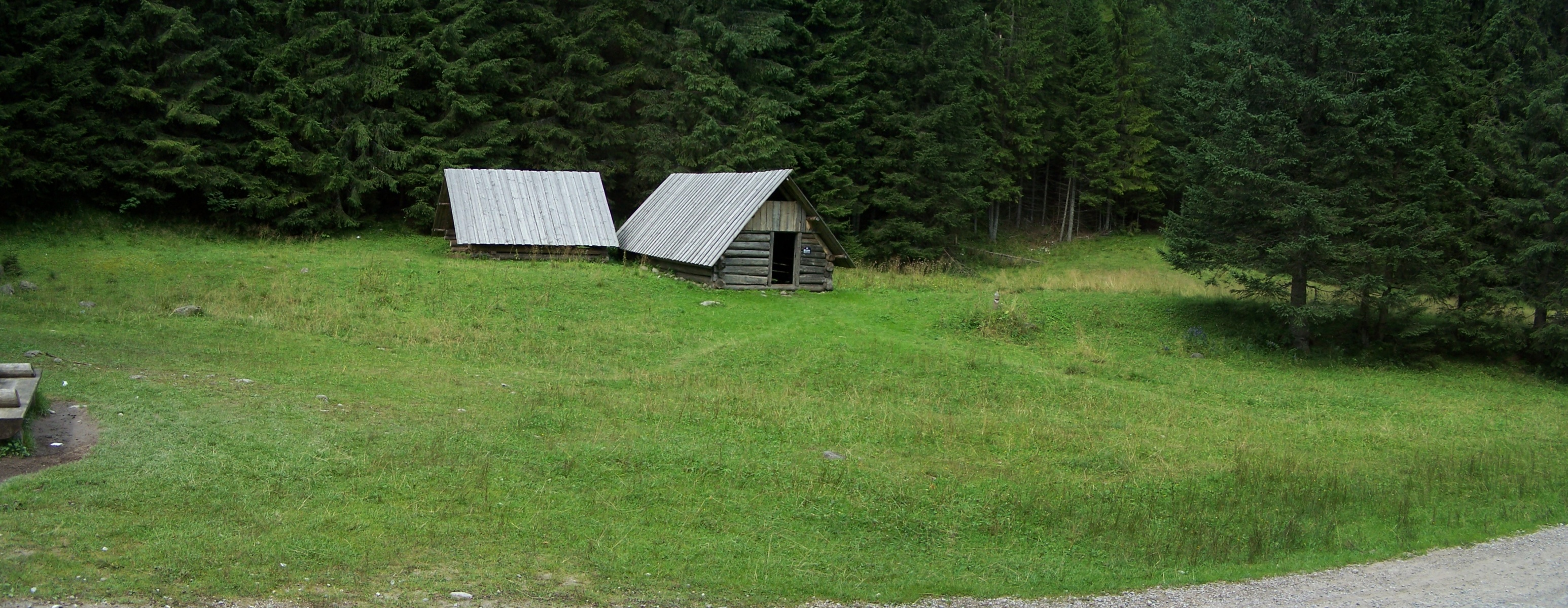 Polana pod Jaworki w Dolinie Chochołowskiej w Tatrach